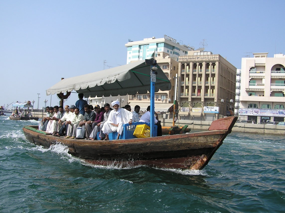 Dubai, Flusstaxi über den Dubai Creek.